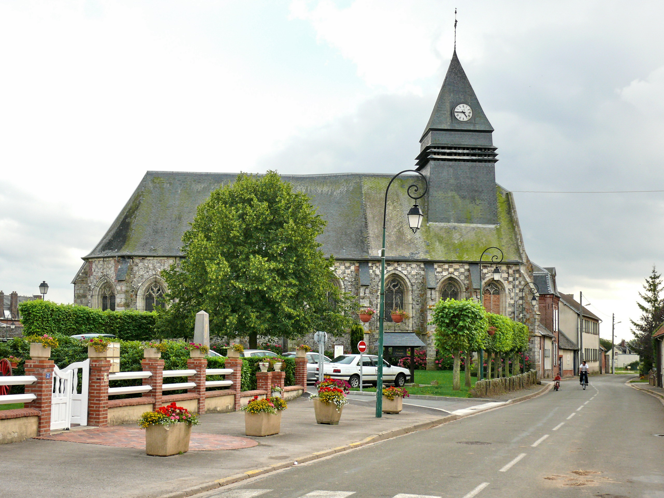 Eglise de Gaudechart (Oise - Picardie - France)